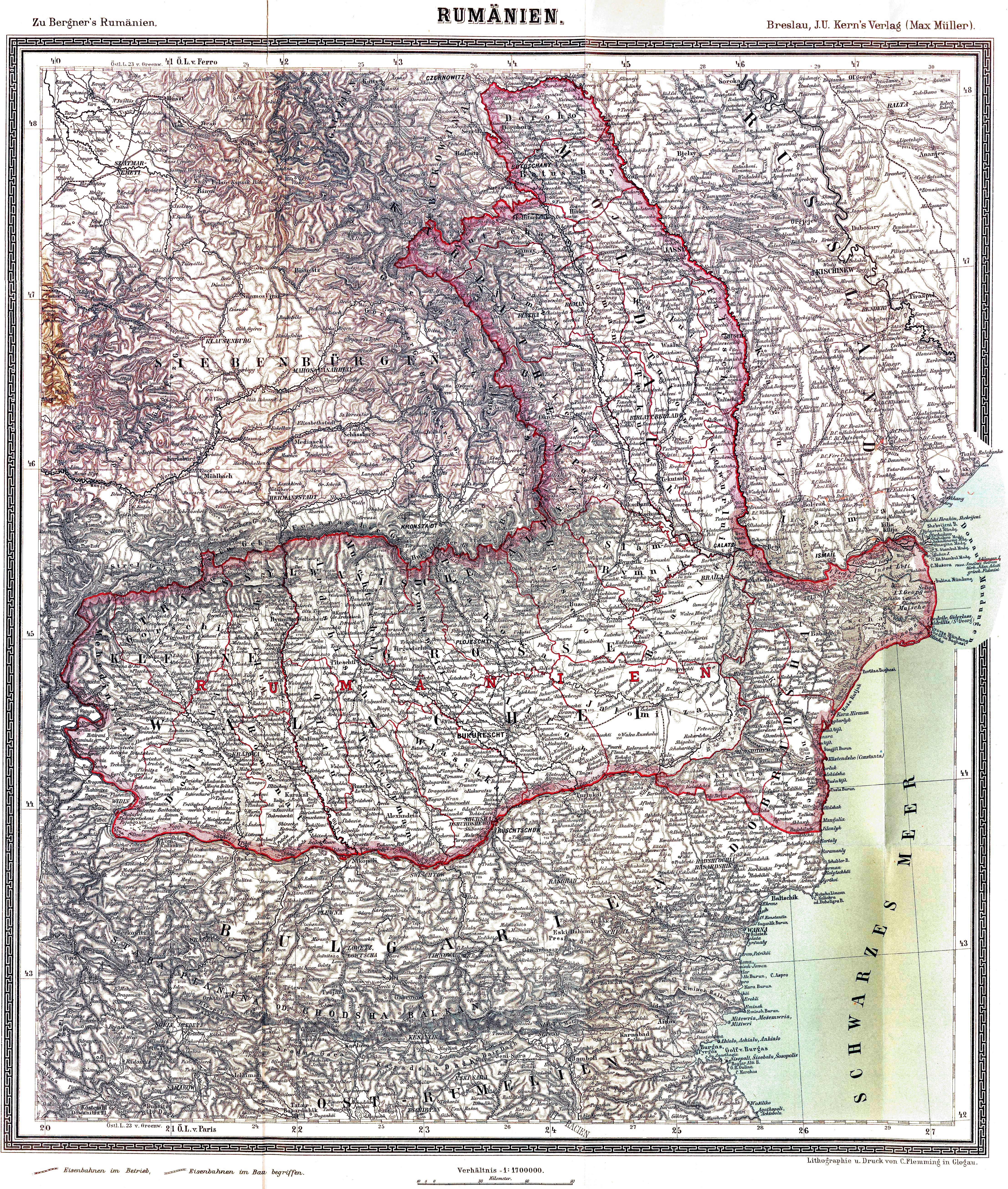 Karte von Rumänien mit den Verwaltungseinheiten von 1879